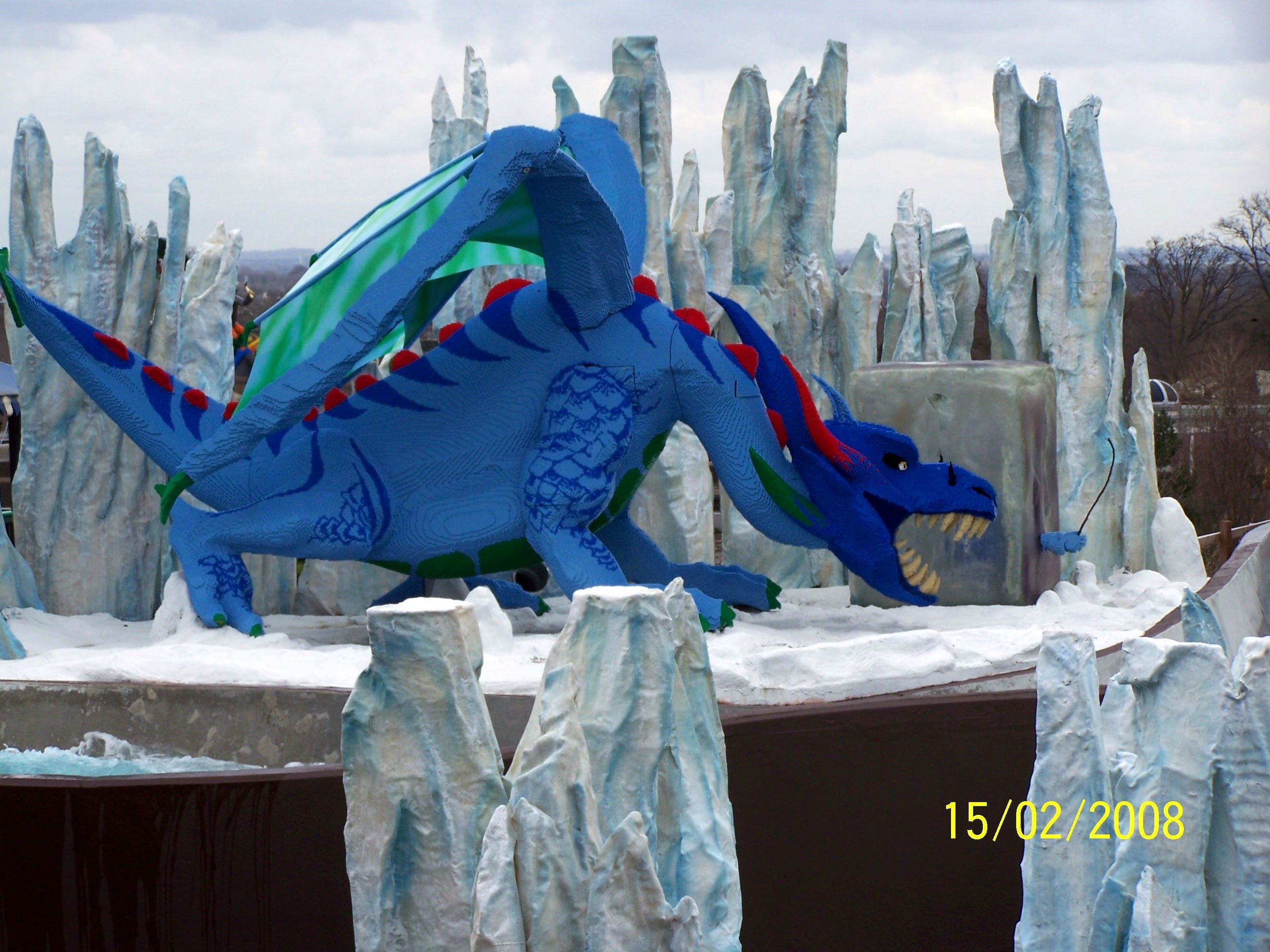 LEGOLAND Windsor, Berkshire, Inglaterra: dragão de gelo decorando o brinquedo "Vikings River Splash".